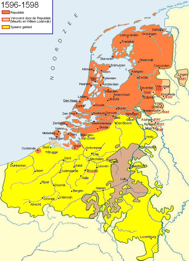 Krijgsbewegingen in de Tachtigjarige Oorlog. 1596 t/m 1598.